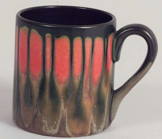 krus produsert på Egersunds Fayancefabriks Co. i perioden 1930-årene. Høyde 9,3 cm. Norsk Folkemuseum, Oslo, NF. 1976-0846.